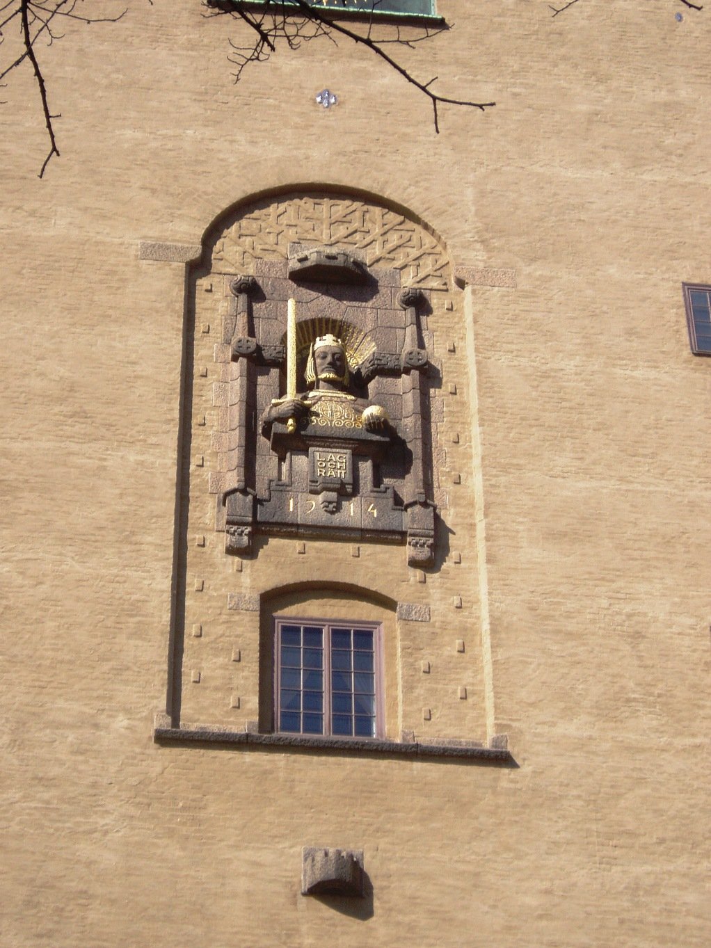 Sankt Erik vid Stockholms rådhus